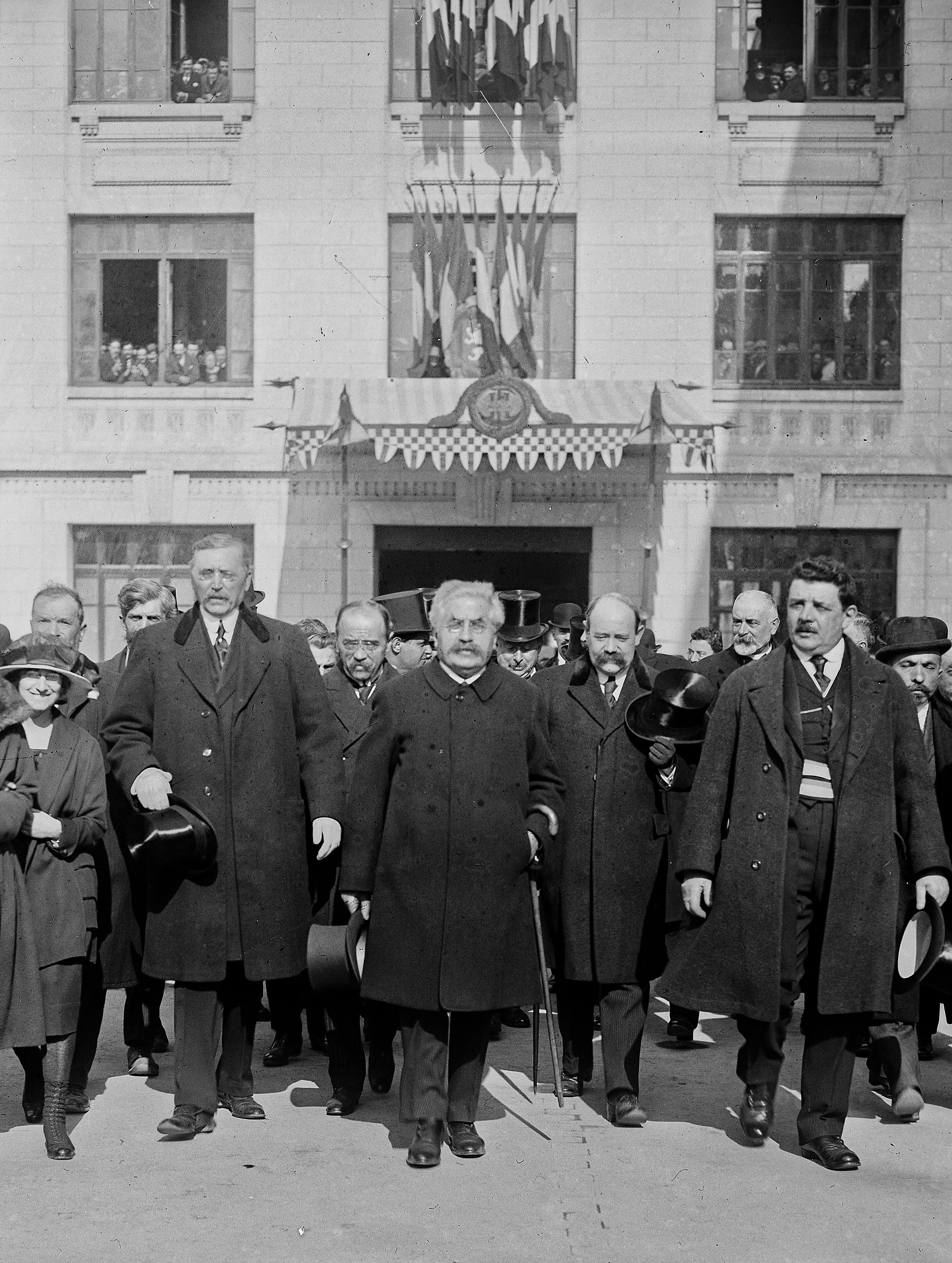 Le président Alexandre Millerand (au centre) quittant la foire de Lyon, avec notamment Édouard Herriot, maire de la ville.